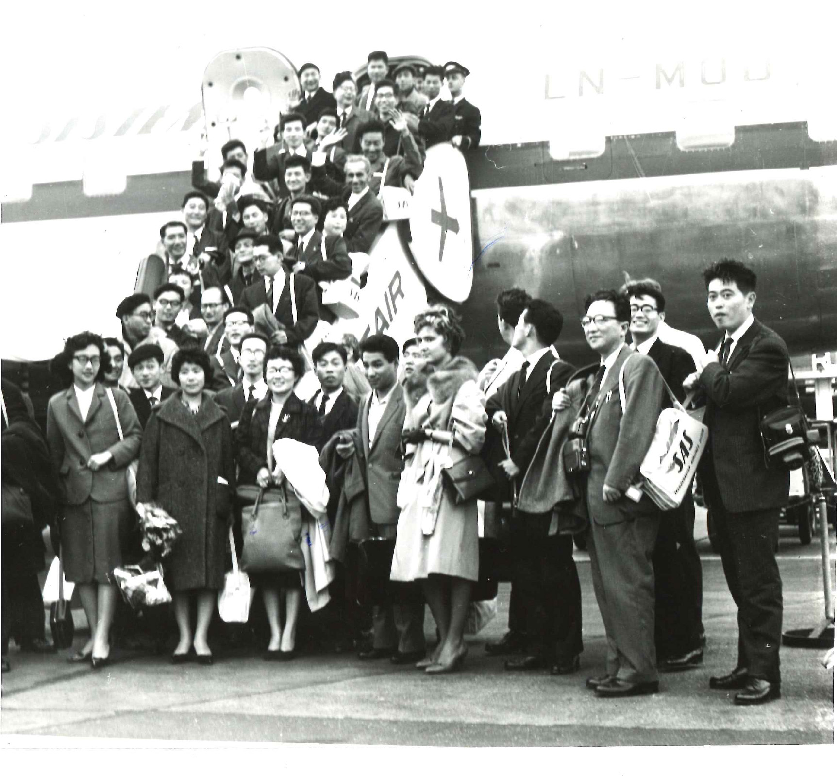 Migros-Kulturprozent, Tokio Philharmonic Orchestra